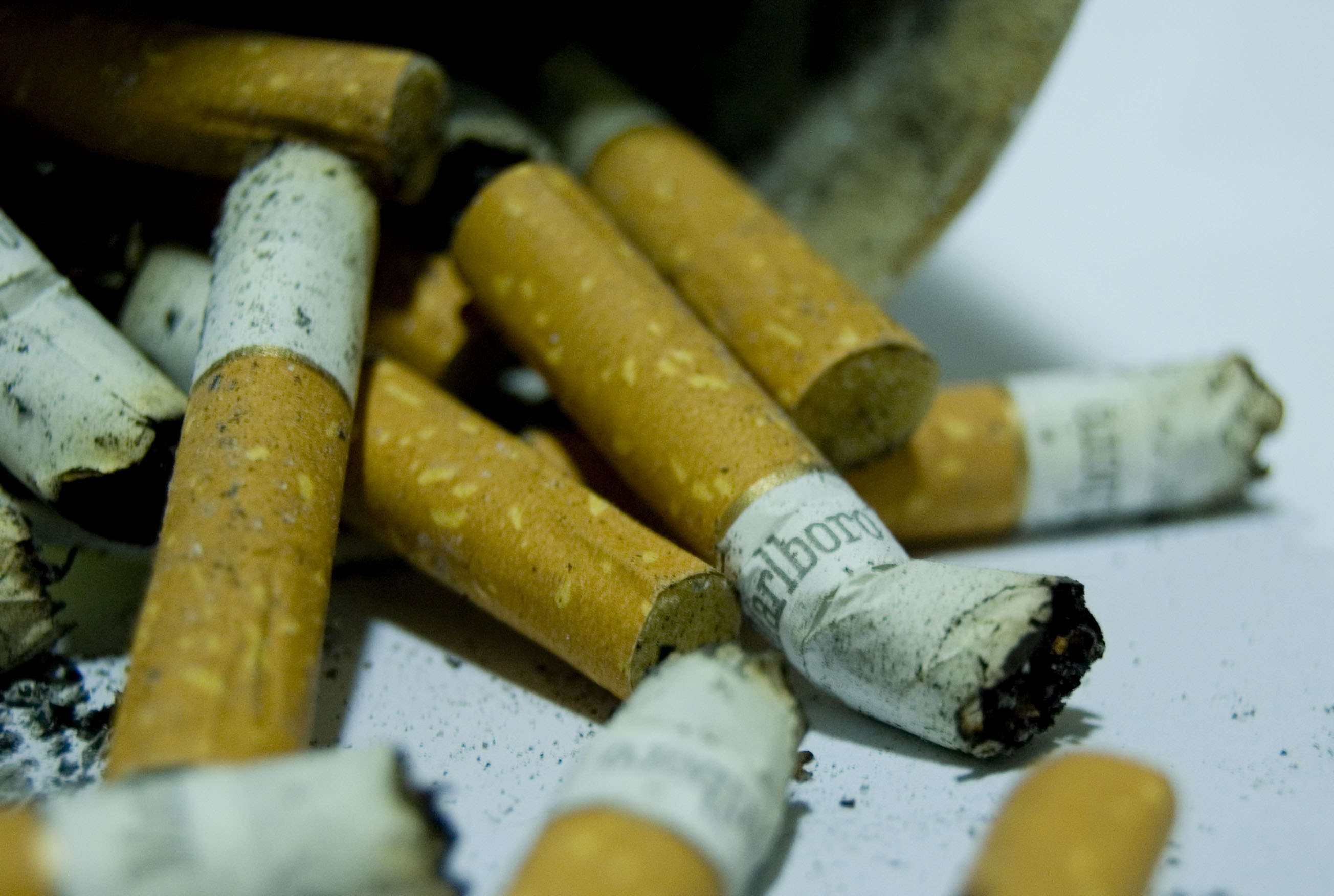 Marlboro Cigarettes